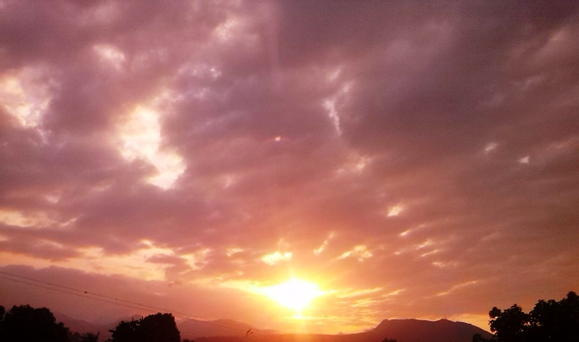 Atardecer en Campo Alegre,Trujillo, Venezuela. Ocaso 6:19 PM (HLV)